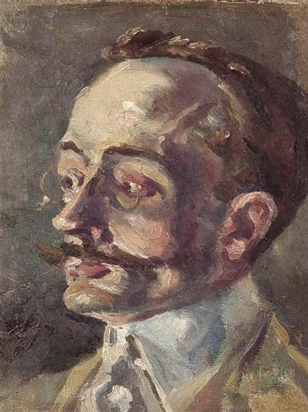 Oleo sobre tela